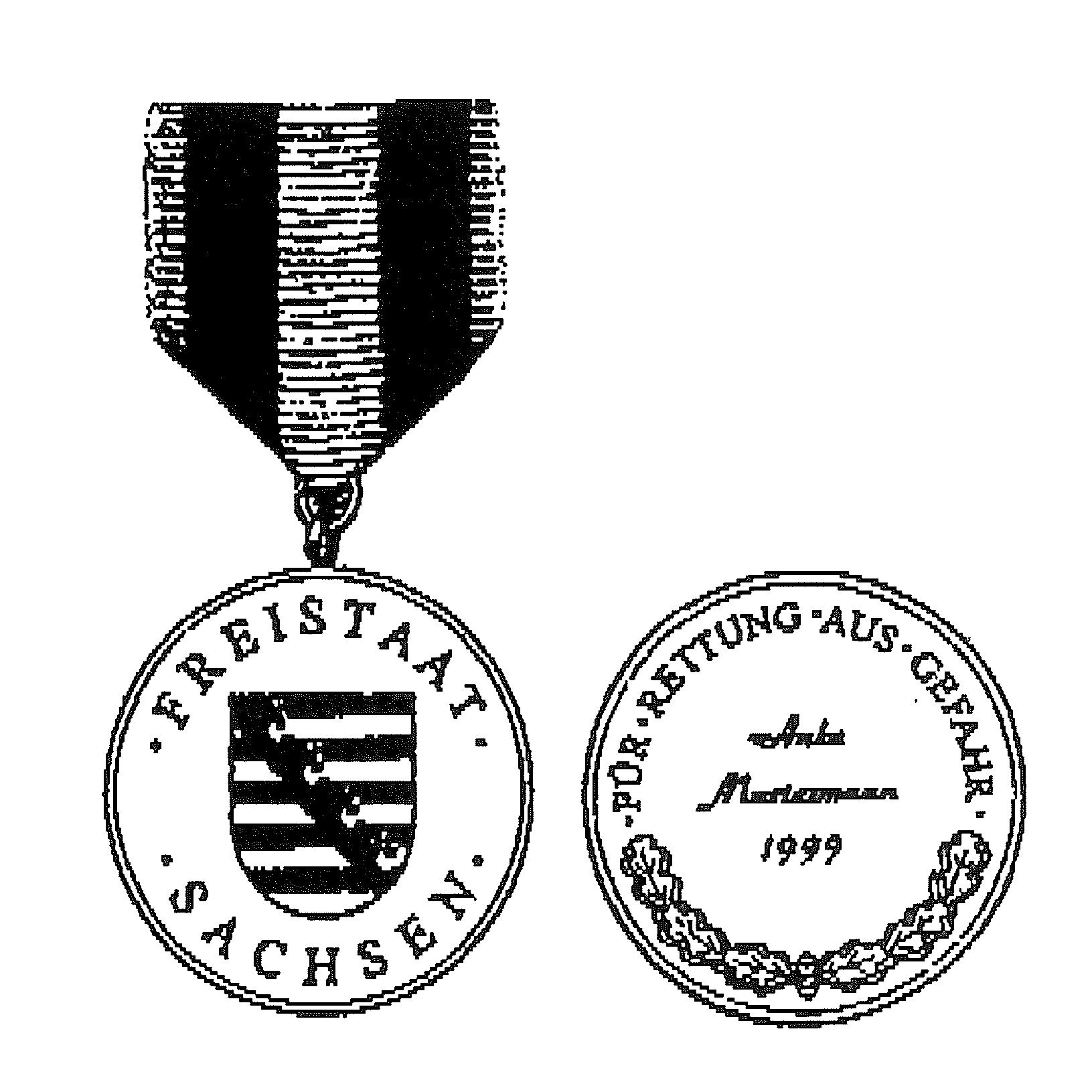 Anlage zur Verwaltungsvorschrift: VwV-Lebensrettungsehrenzeichen mit Bild des Lebensrettungsehrenzeichens